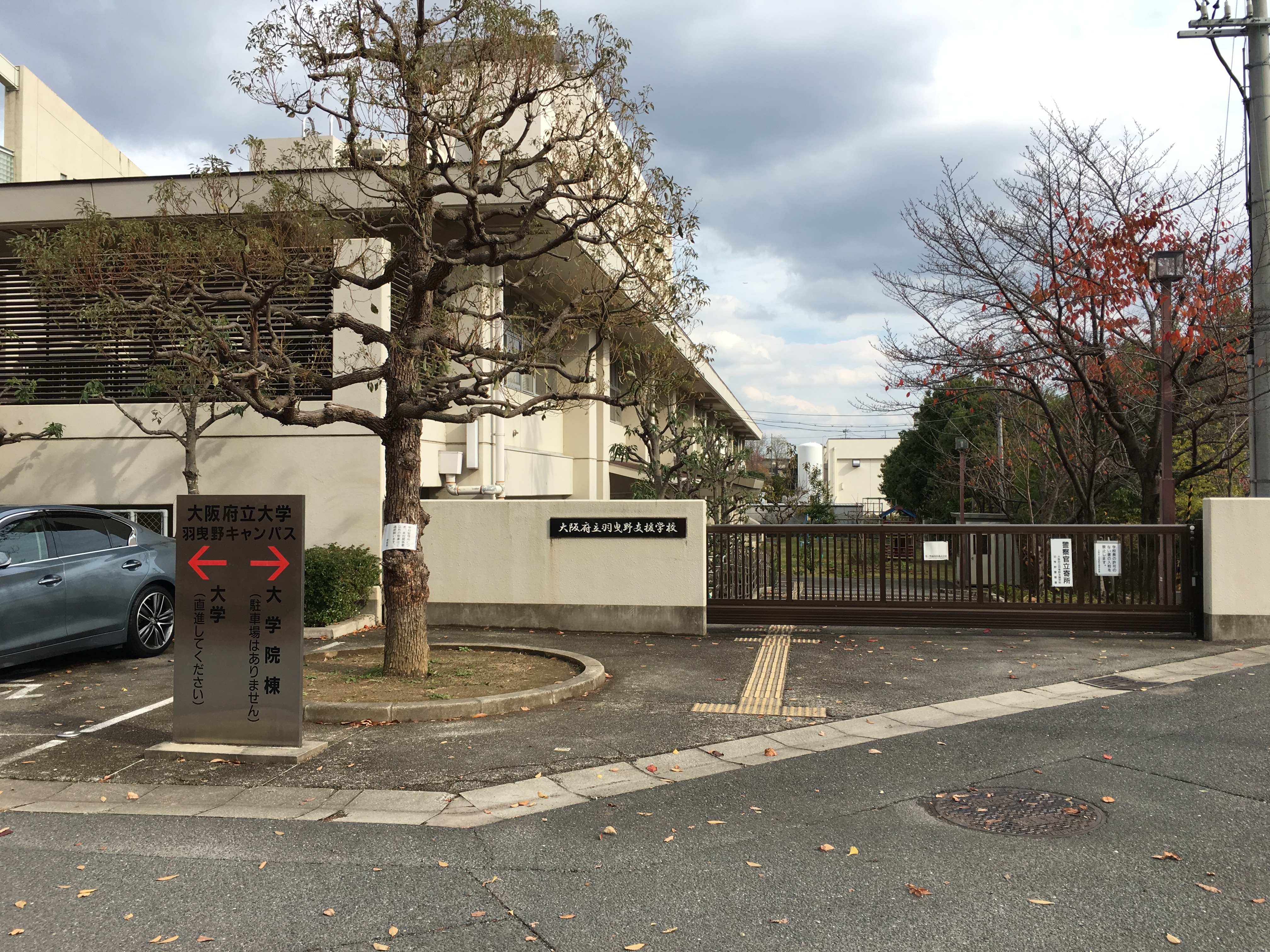 大阪府立羽曳野支援学校